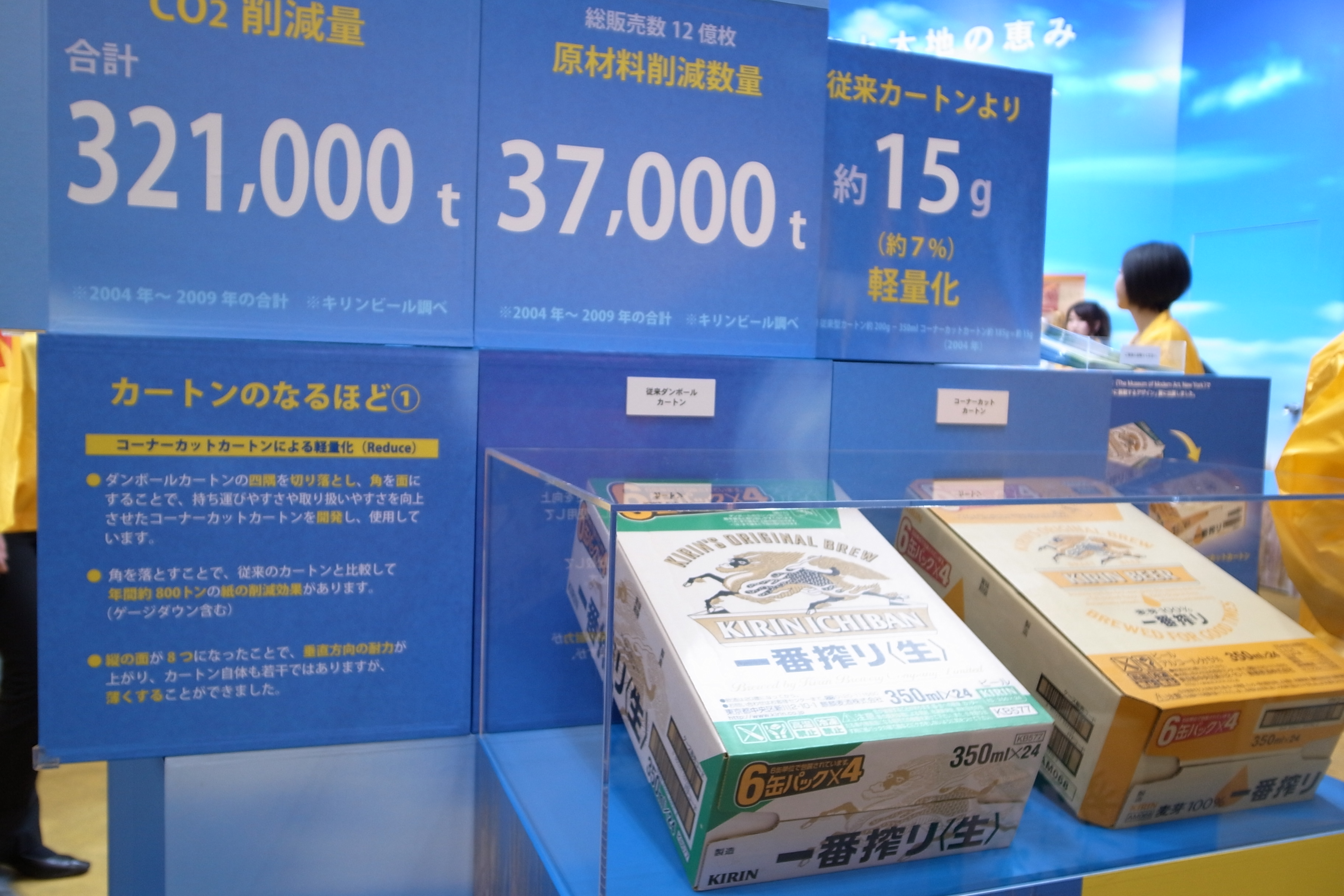 パッケージの角をつける（8面体）にすることで、強度が上がり紙を薄くする事が可能になった